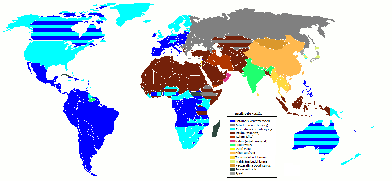 Az uralkodó vallások. Egy-egy területen a domináns vallás(ok) van(nak) jelölve.